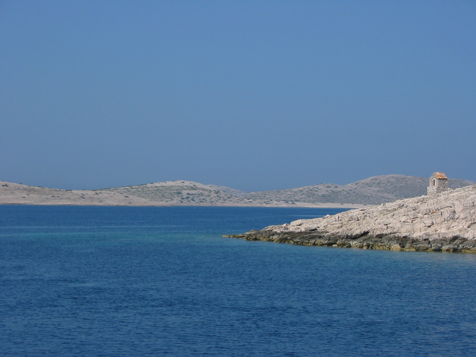 Kornati islands